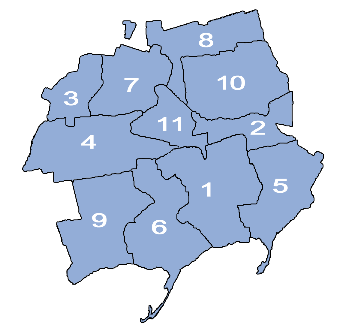 Карта Бердянської округи